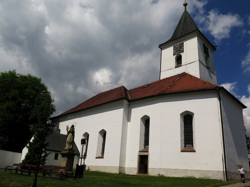 Kostel svatého archanděla Michaela, Všeruby (okres Domažlice).